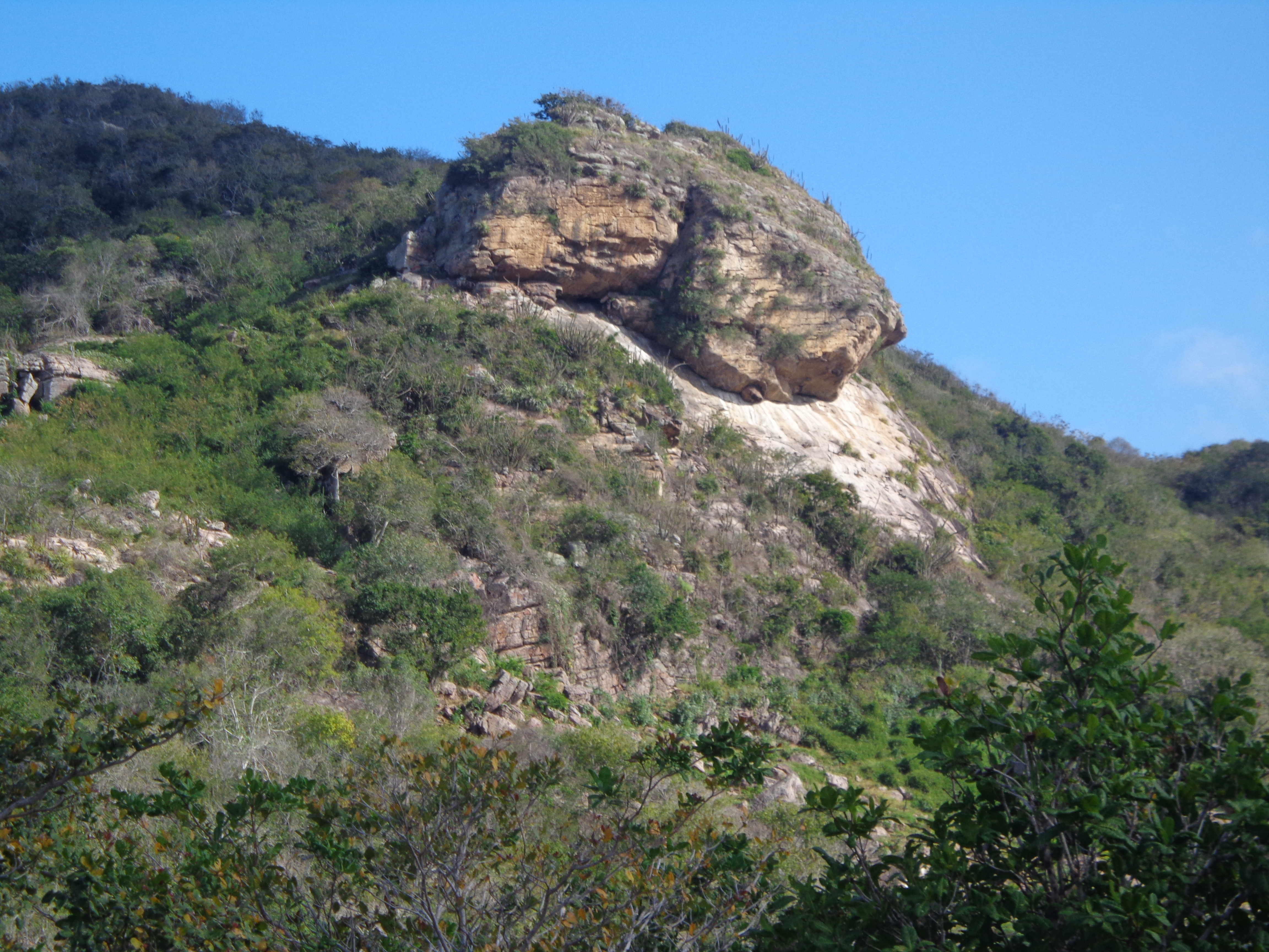 serra situada no município de Morrinhos